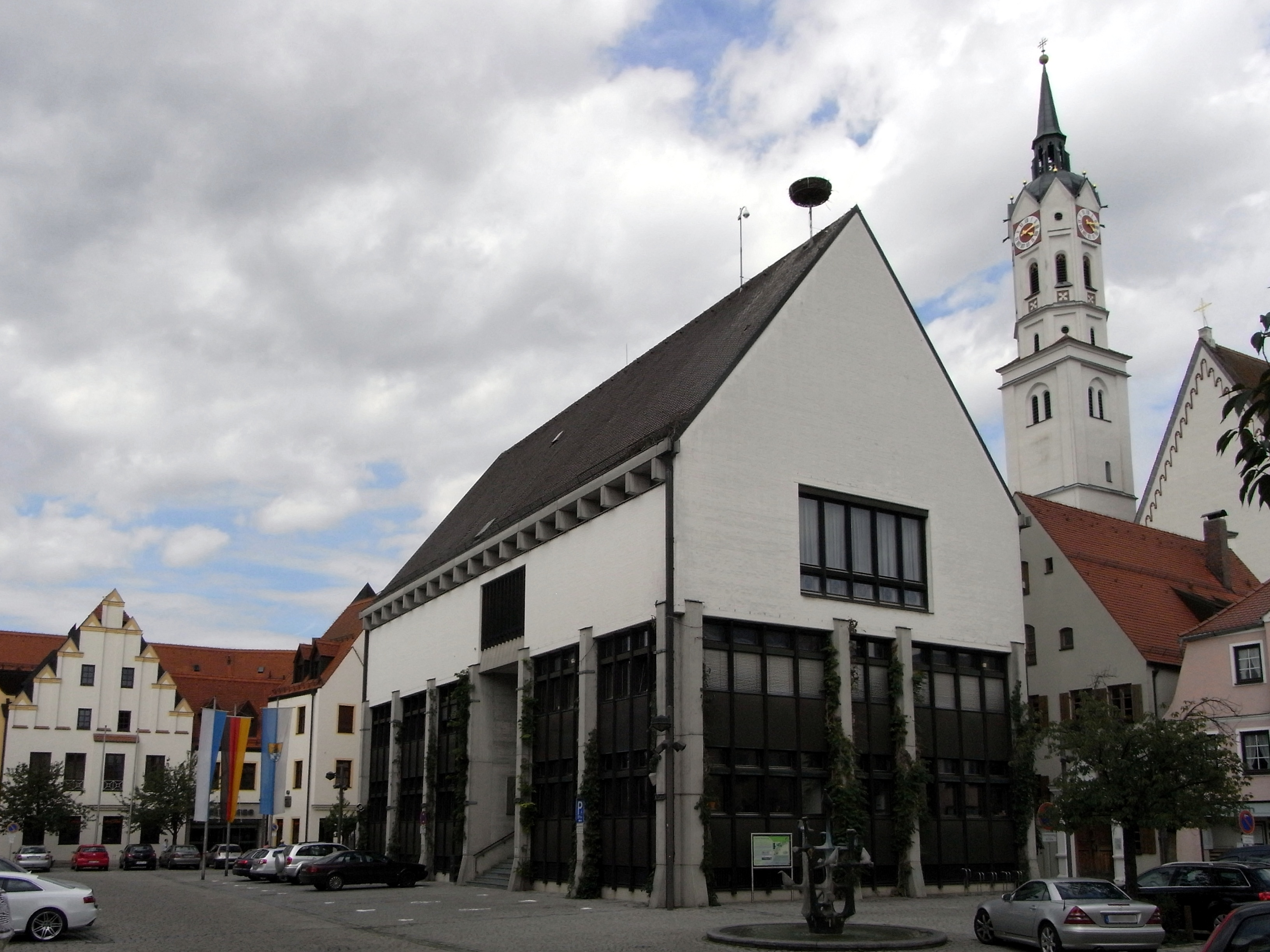 Schrobenhausen, Rathaus. Im Vordergrund der Rathausbrunnen, rechts die Pfarrkirche Sankt Jakob.